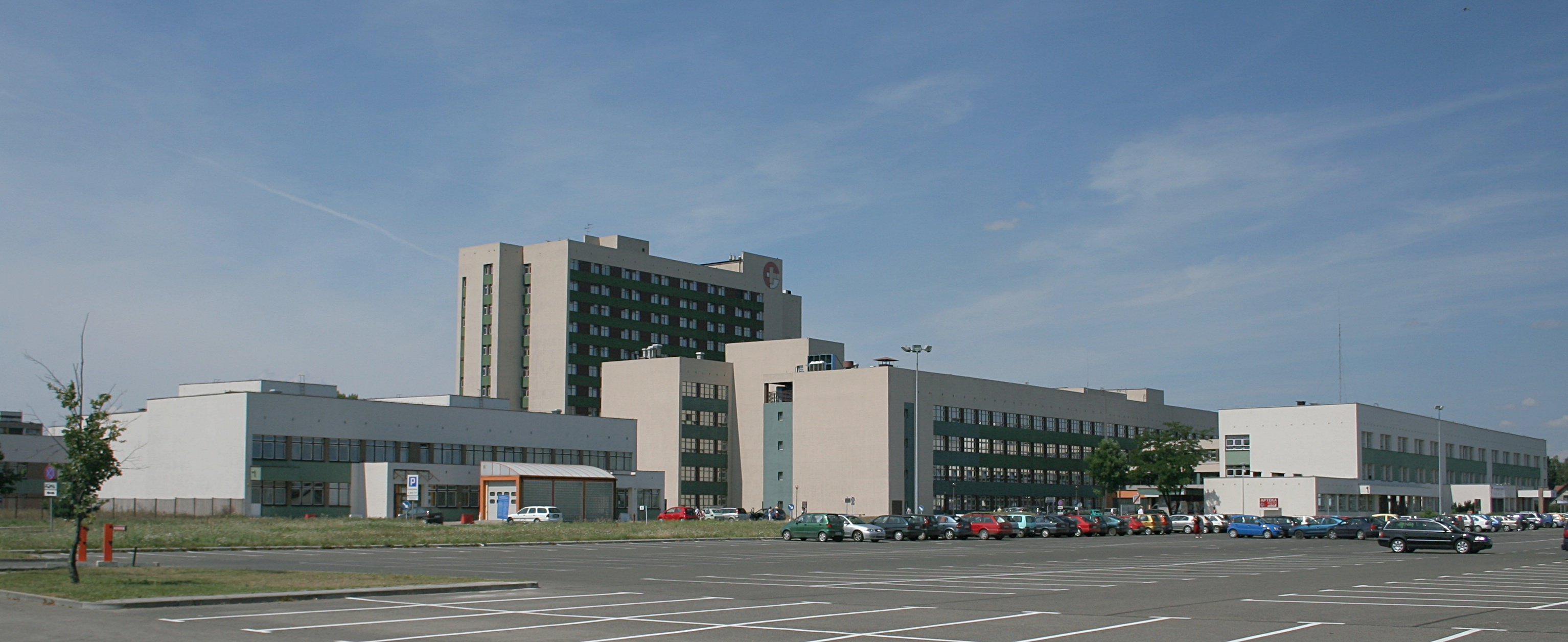 Česky: Vojvodská nemocnice v Orzepowcích, v části Rybnika (Dolnoslezské vojvodství), Polsko